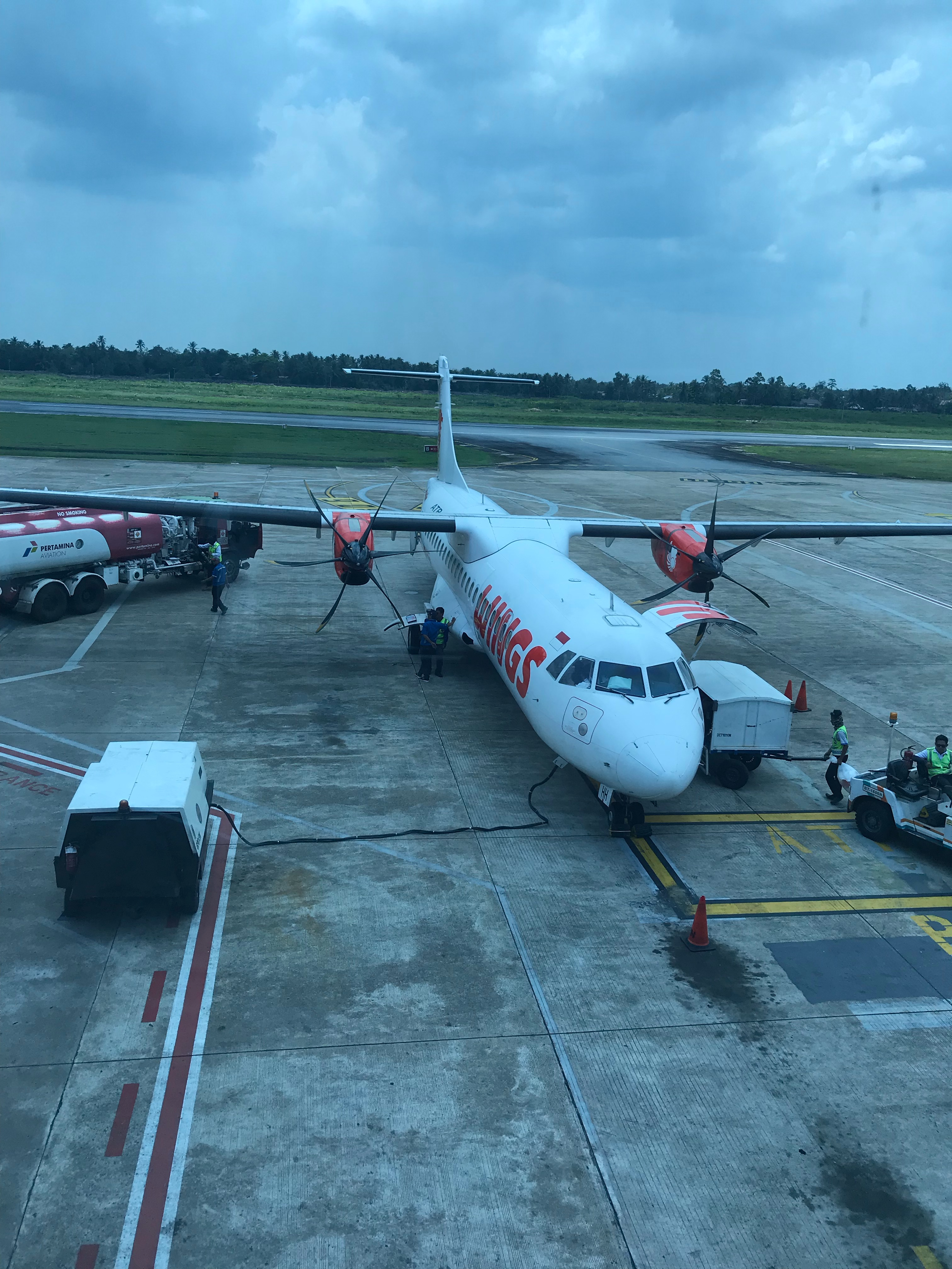 Imej ini diambil pada Masa Tengah Hari